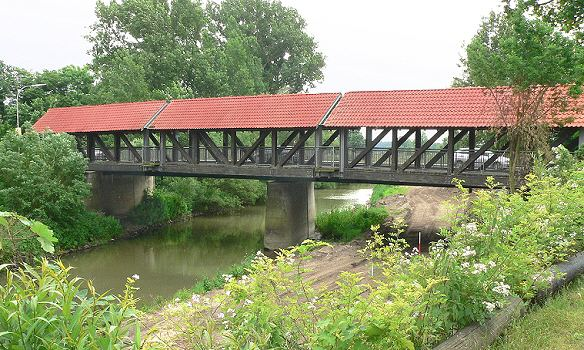 Okerbrücke der B 188 in Meinersen